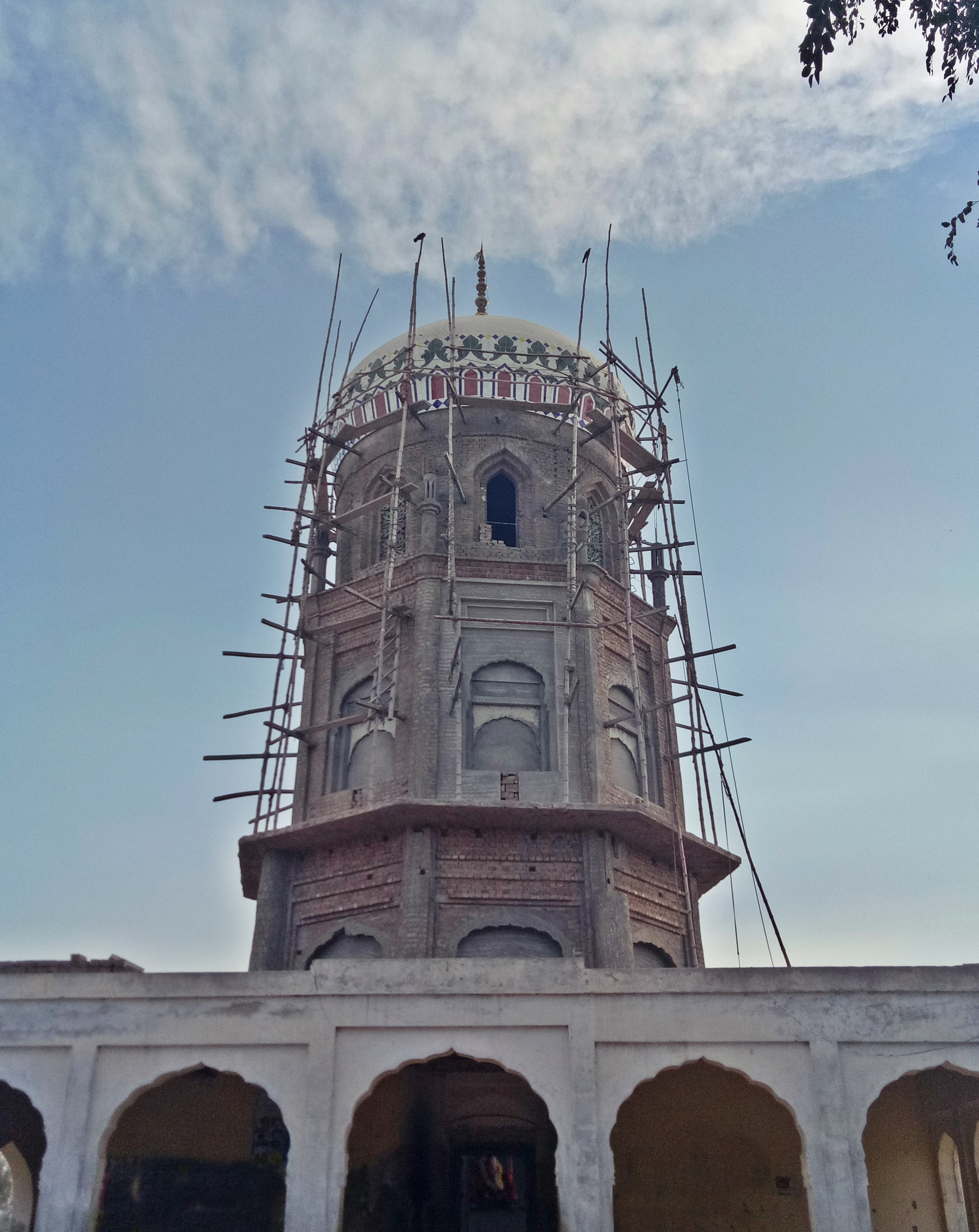 حضرت مخدوم حسن قتال (رح) کا زیر تعمیر مقبرہ۔